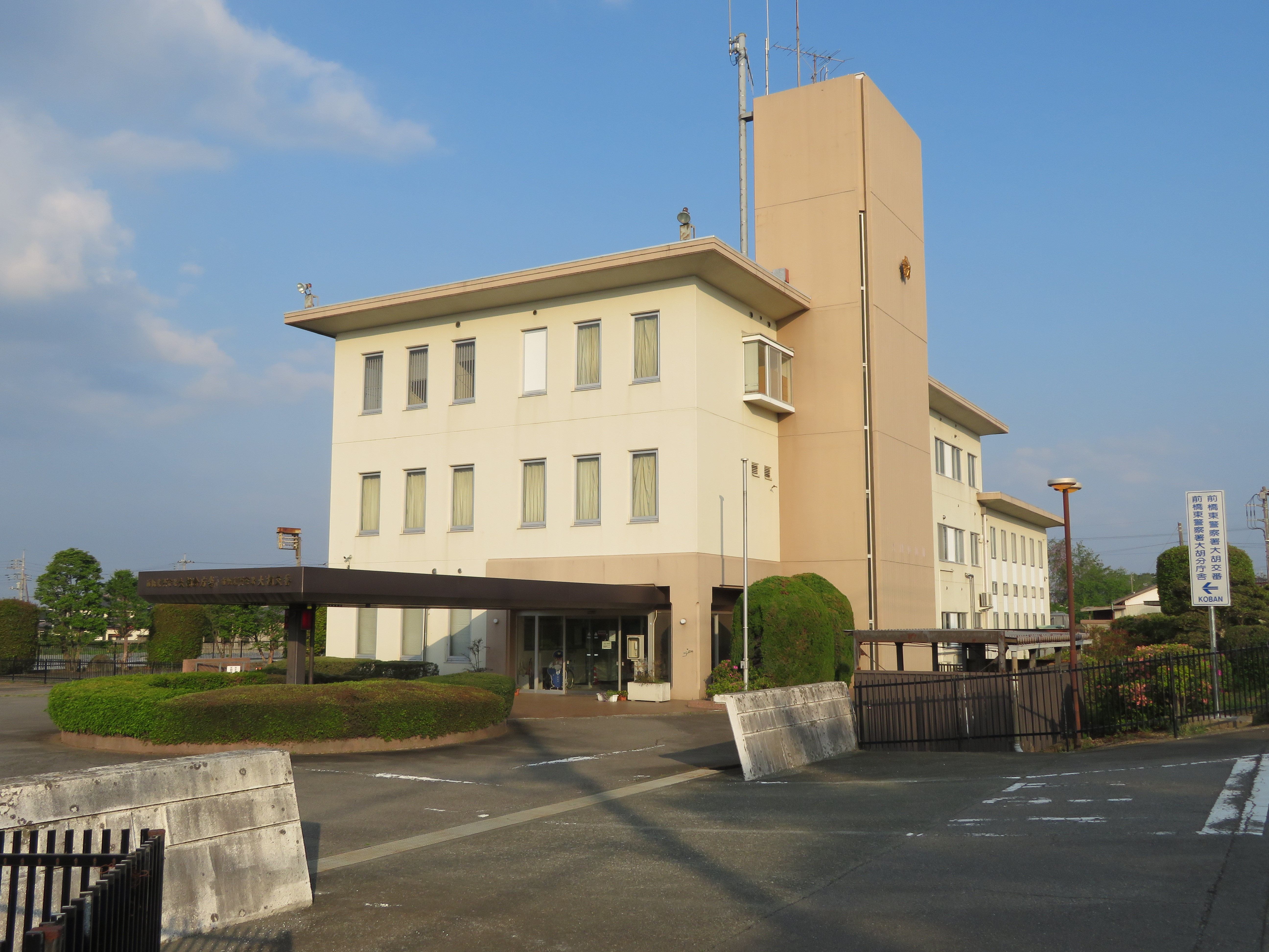 前橋東警察署大胡分庁舎（旧大胡警察署庁舎） Canon PowerShot SX720 HS